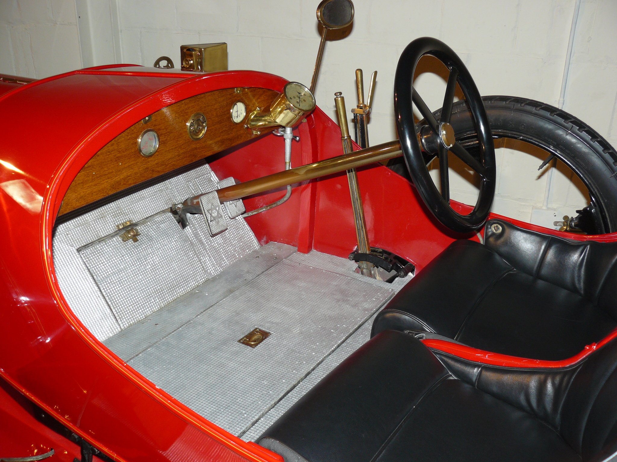 Auburn/Cord Muséum 2013